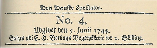 Titeloverskrift fra et nummer af Den danske Spectator, fra 5. juni 1744